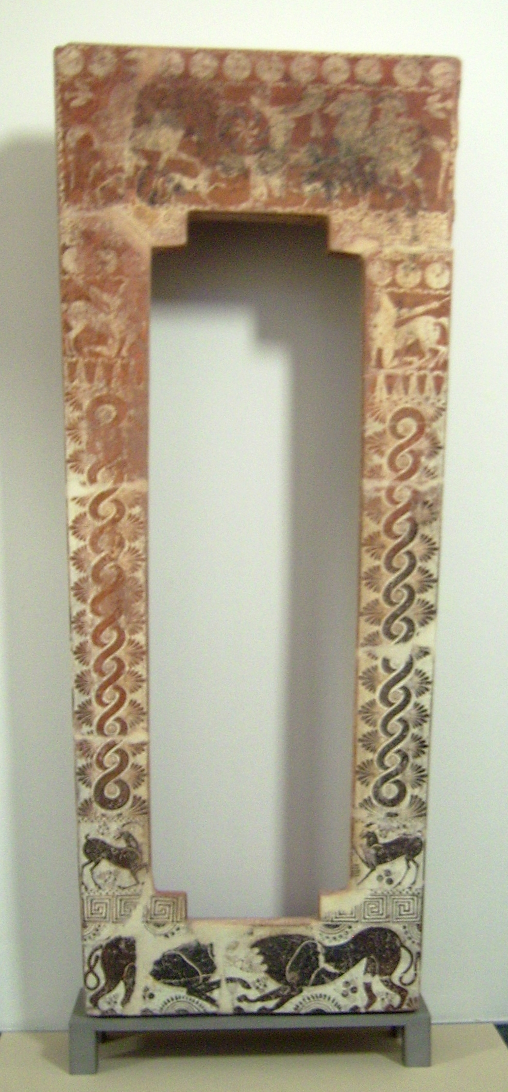 Klazomenischer Sarkophag der Antikensammlung Berlin im Pergamonmuseum, zwischen 520 und 470 v. Chr.